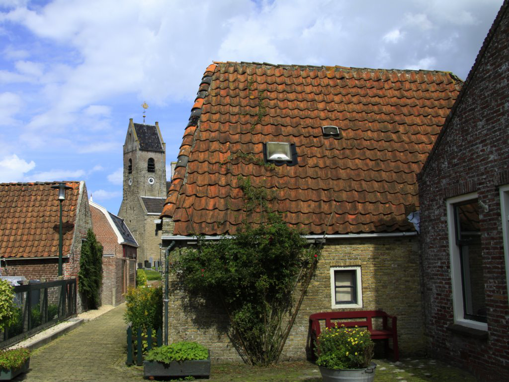 Wierum. Aan de windvaan op de toren van Wierum kunnen we nog zien dat het vroeger een vissersplaats is geweest, geen haan maar een tweemast Schokker. Als je door de straatjes van Wierum rond stapt, dan proef je nog de sfeer van een vissersdorp. Jammer dat na de ramp op zee in 1893 waarbij de hele vloot verloren ging, daar een einde aan is gekomen. Als je in de buurt ben ga dan beslist een kijkje nemen in dit mooie dorp. En ook even de dijk op voor een machtig gezicht over de Waddenzee.